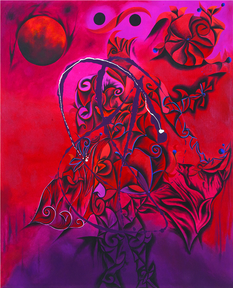 Триптих, собрание автора, Куэрнавака